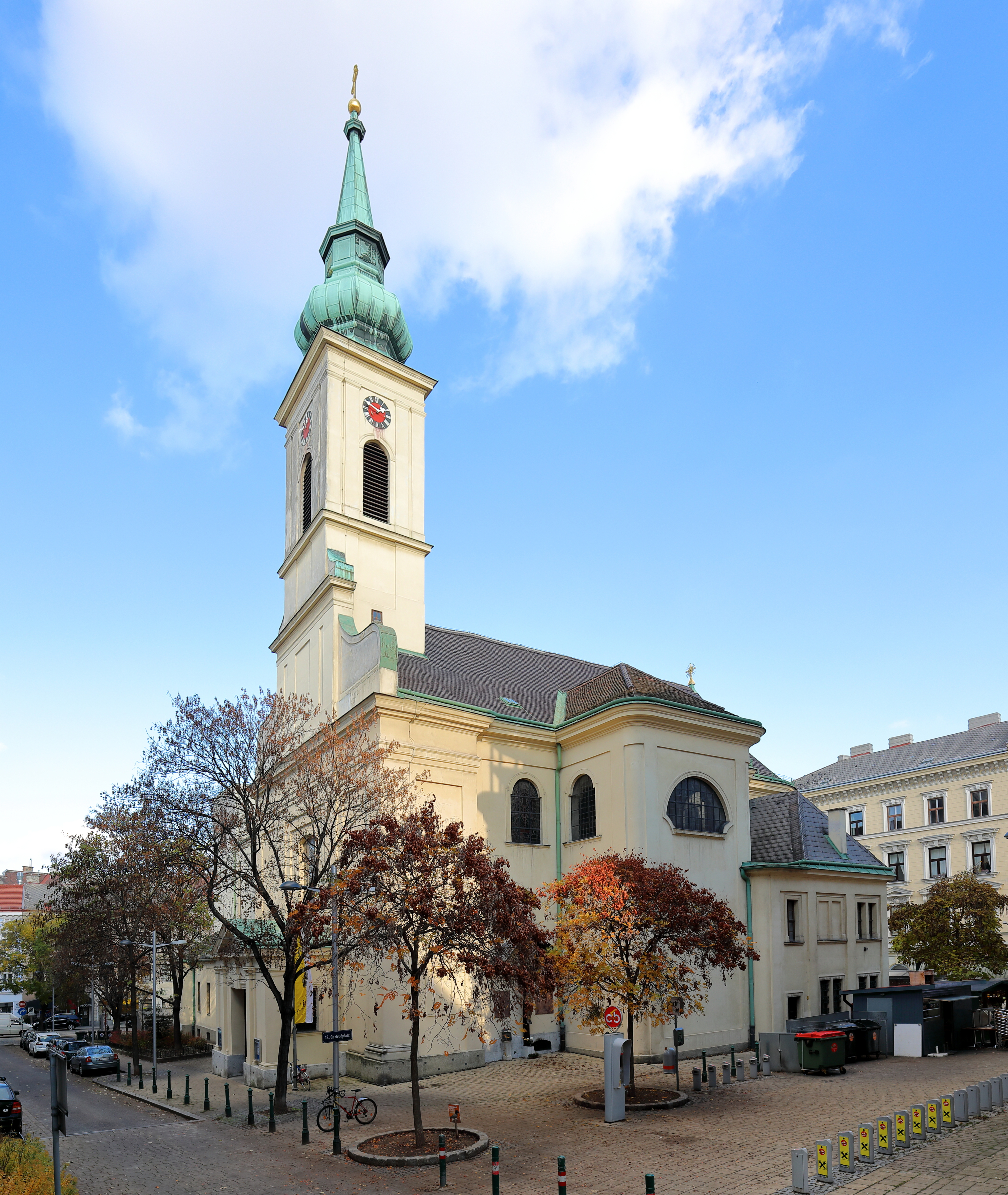 Südwestansicht der röm.-kath. Pfarrkirche hl. Gertrud im 18. Wiener Gemeindebezirk Währing.Die Kirche wurde ab 1753 anstelle einer einsturzgefährdenden Kirche neu errichtet. 1858 ersetzte man den alten Kirchturm durch einen westseitigen Fassadenturm. 1885 erfolgte der Bau eines Portalvorbaues an der Westseite. 1934 wurde nordseitig ein großer multifunktionaler Kirchenraum mit rechteckigem Grundriss an die barocke Kirche angebaut.